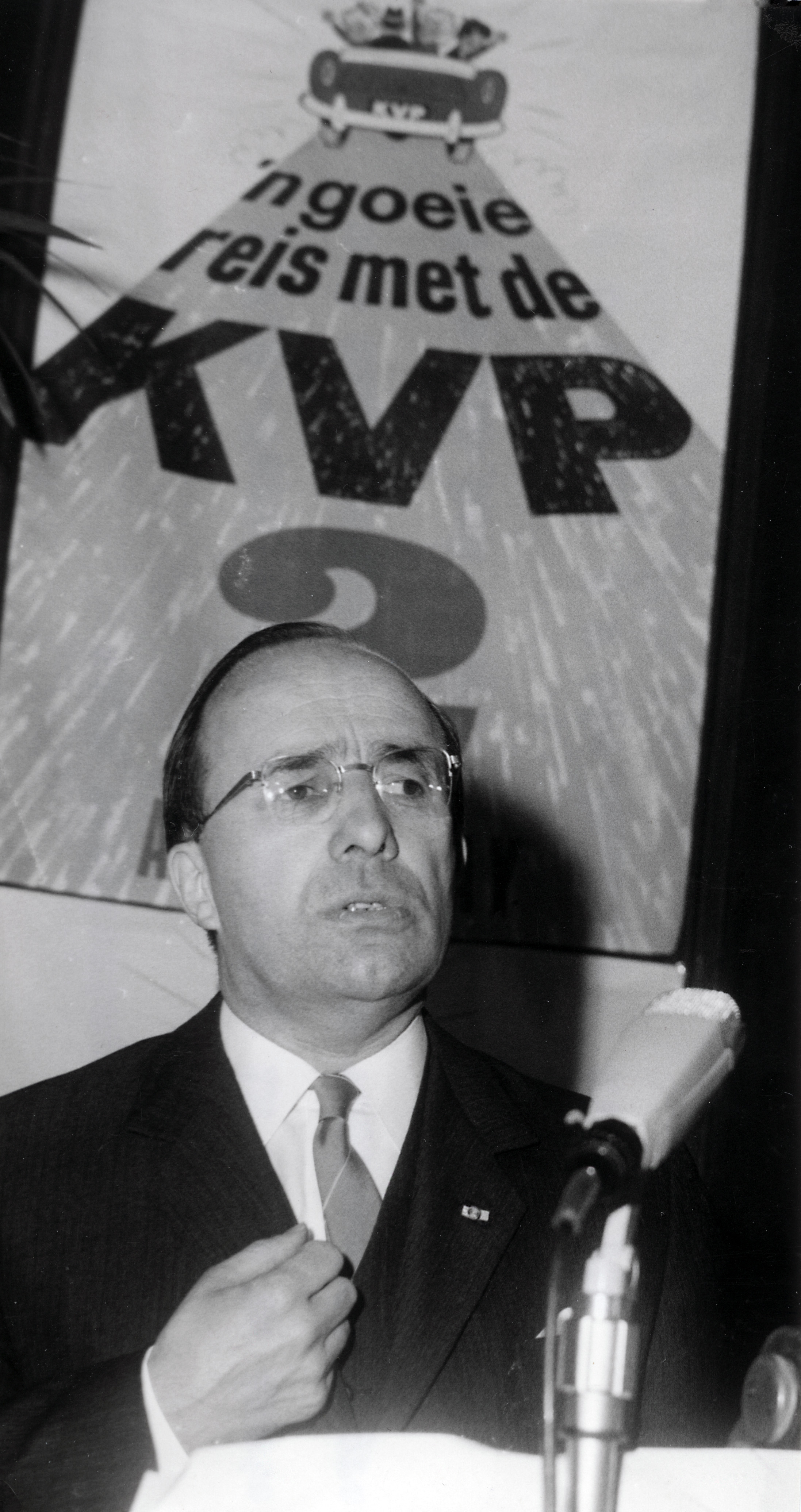 K.V.P.-verkiezingsvergadering in Krasnapolsky te Amsterdam, Nederland 21 maart 1966. Foto: Minister president Mr. Cals als voornaamste spreker aan het woord.